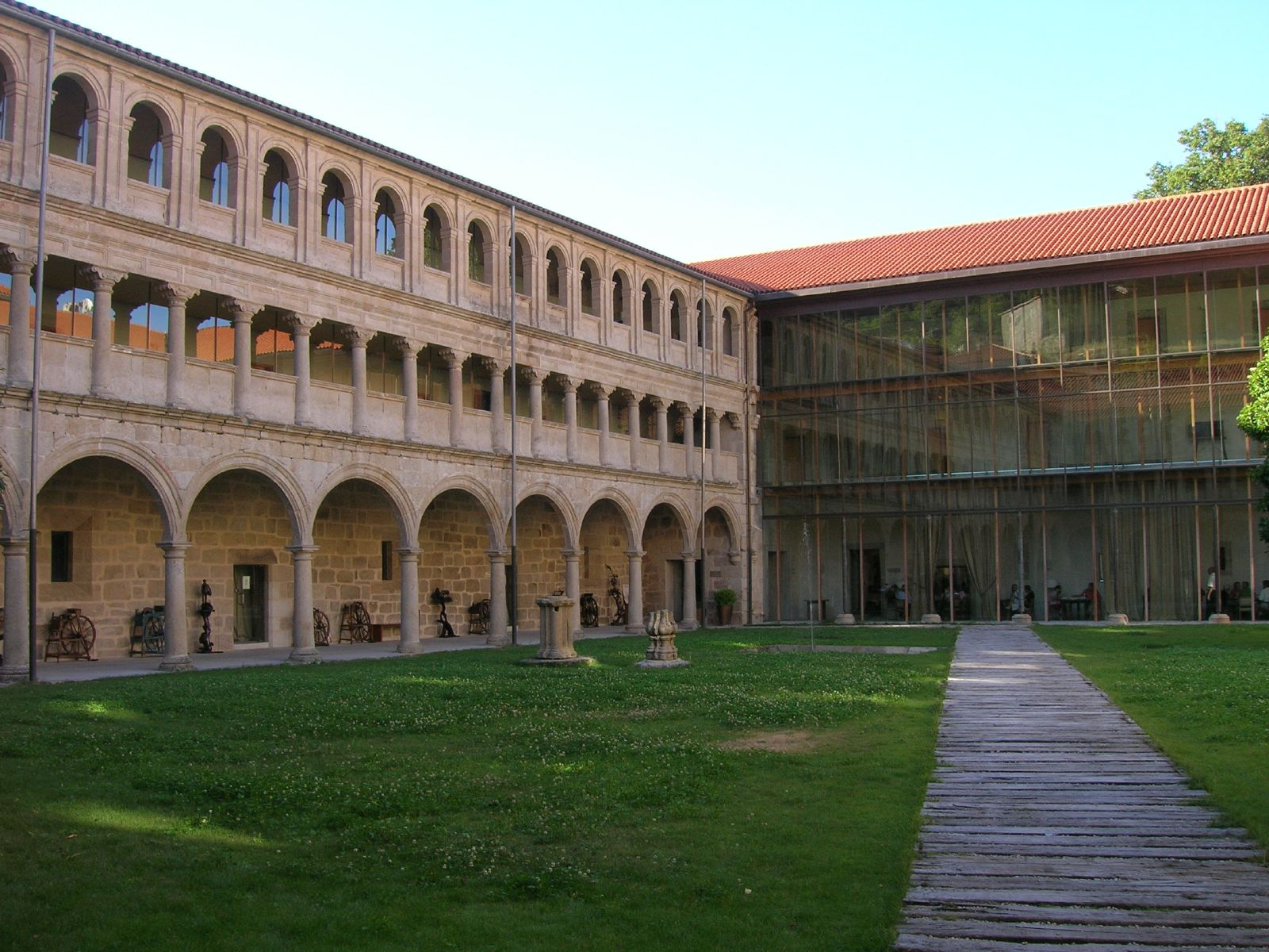 Mosteiro de Santo Estevo de Ribas de Sil, Nogueira de Ramuín, Galiza. Claustro Grande ou da Portería. Tralo cristal, atópanse as instalacións do Parador de Turismo, soamente accesibles para clientes.